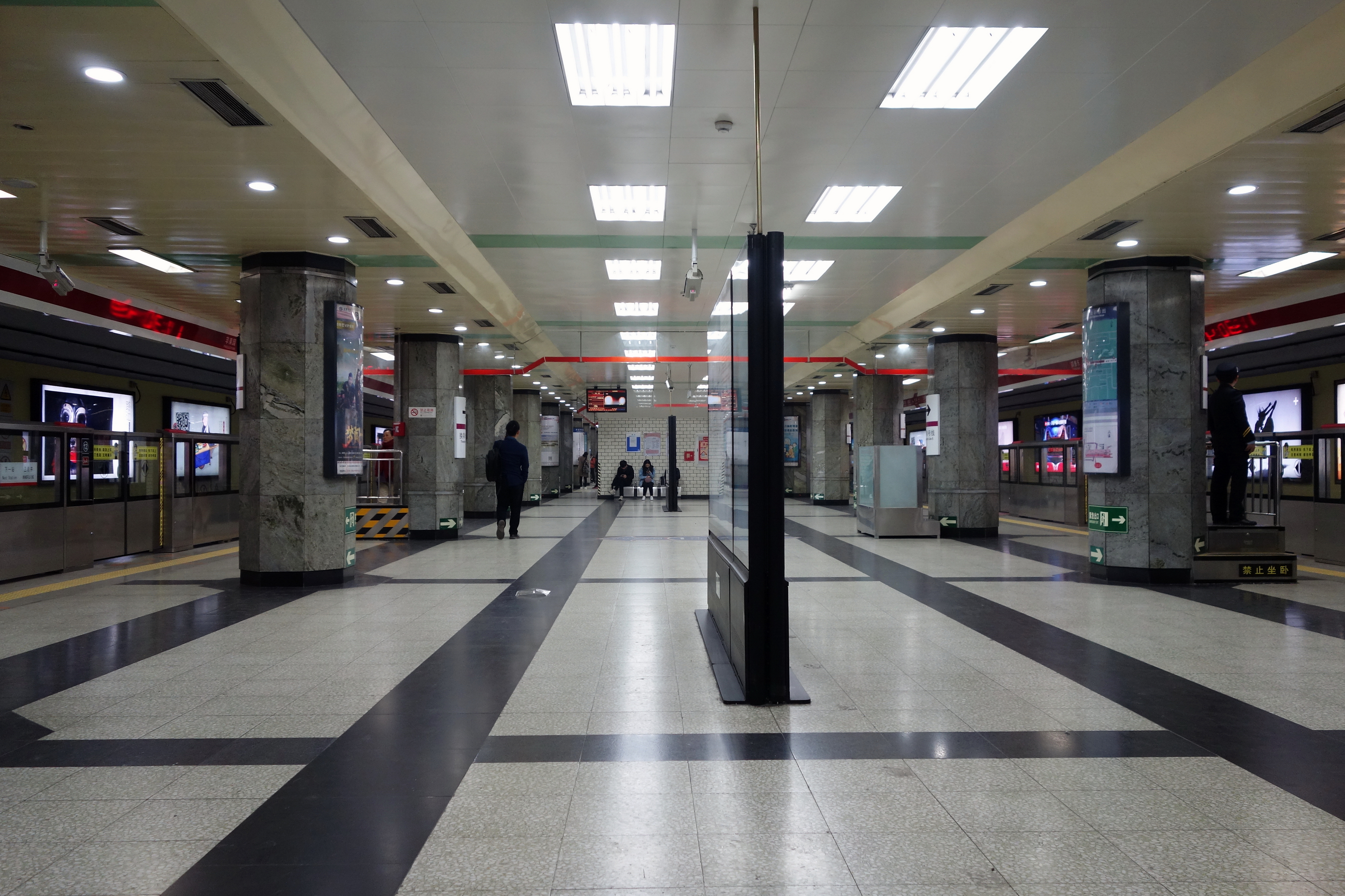 北京地铁1号线东单站岛式站台，站台加装半高式屏蔽门2017年投入使用。